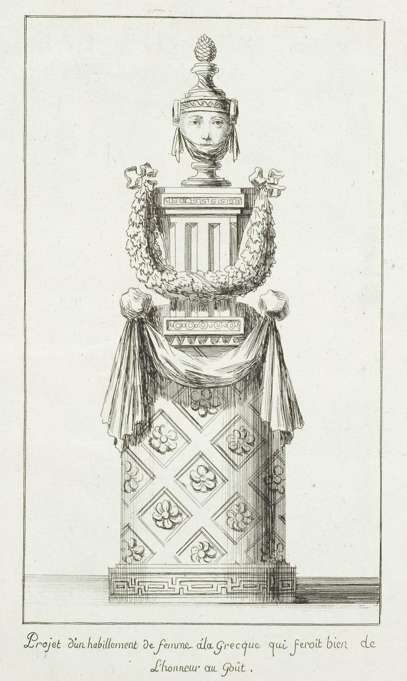 Grafik aus dem Klebeband Nr. 14 der Fürstlich Waldeckschen Hofbibliothek Arolsen Motiv: Projet d'un habillement de femme à la Grecque qui feroit bien de l'honneur au goût